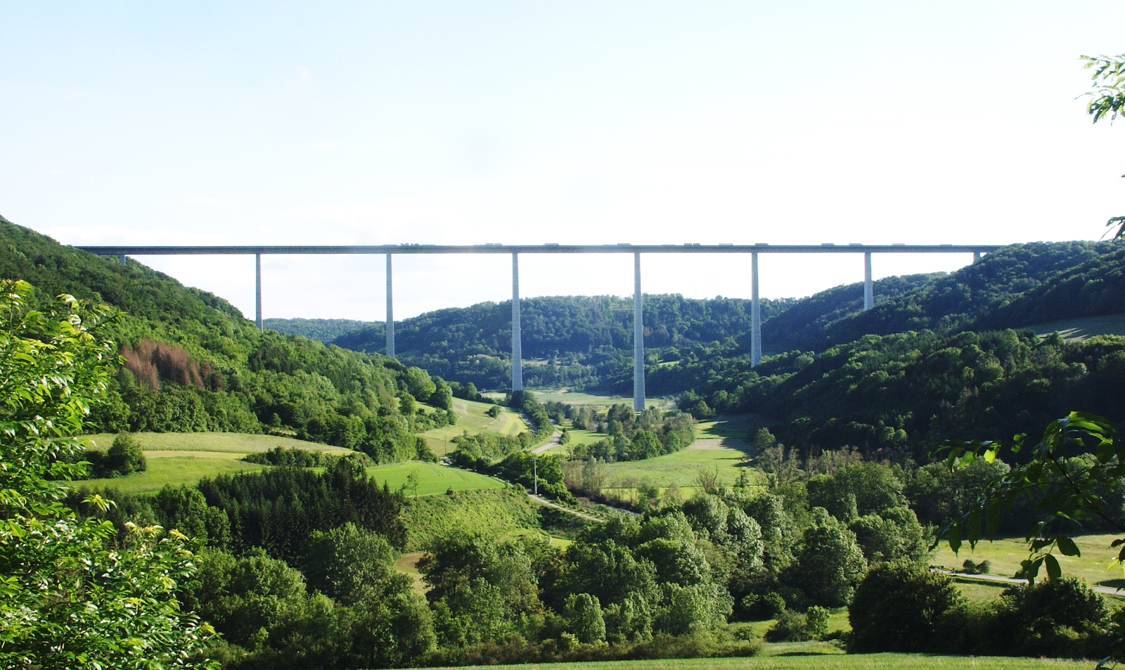 Kochertalbrücke, district of Schwäbisch Hall, Germany